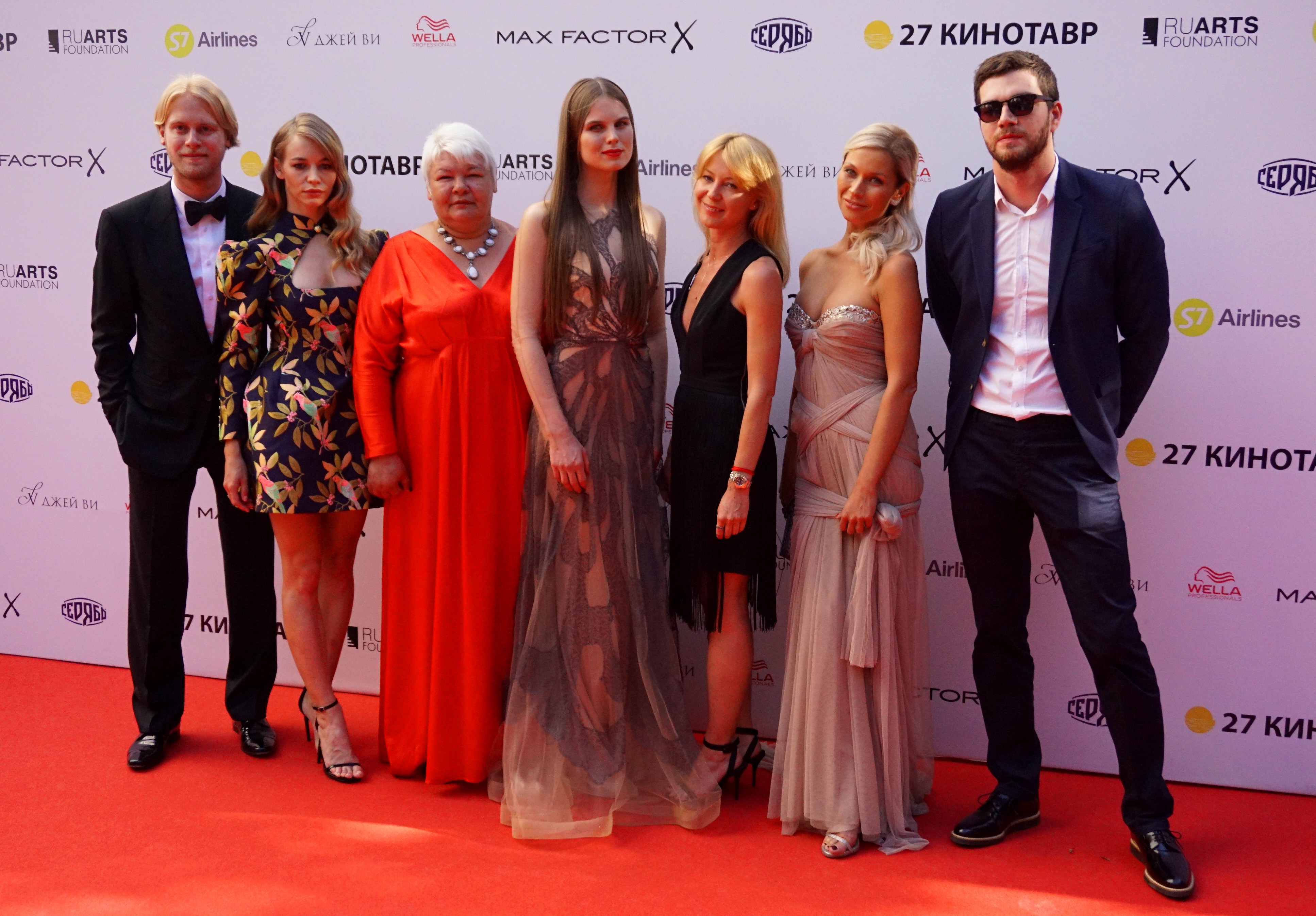 Съёмочная группа фильма "Ученик". «Ученик» — российский драматический фильм режиссёра и сценариста Кирилла Серебренникова, снятый по пьесе Мариуса фон Майенбурга. Сочи, 2016.